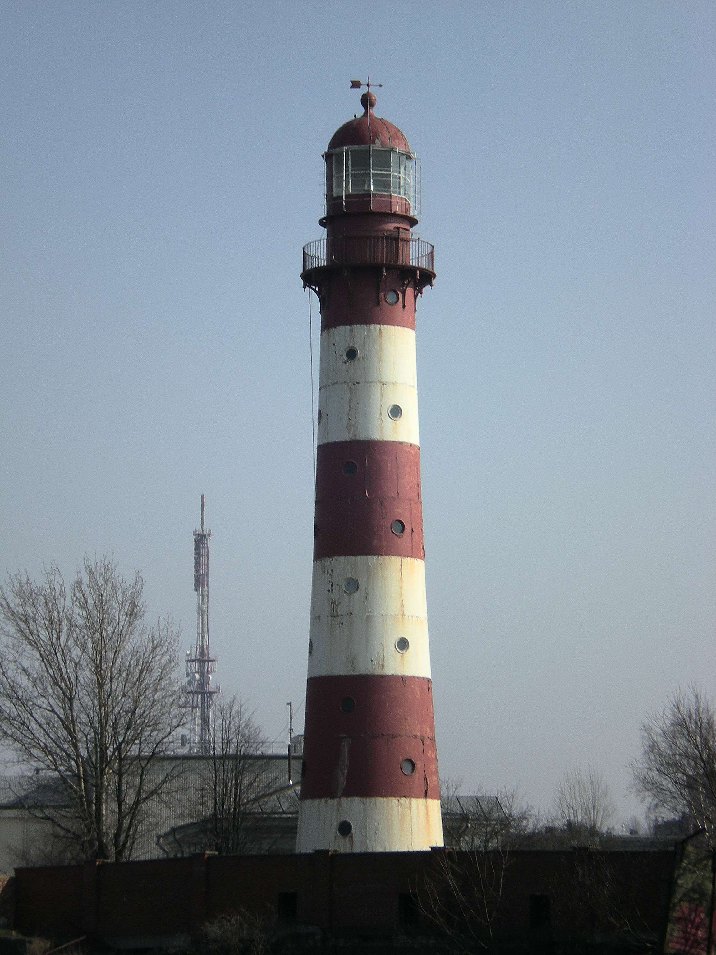 Liepaja lighthouse